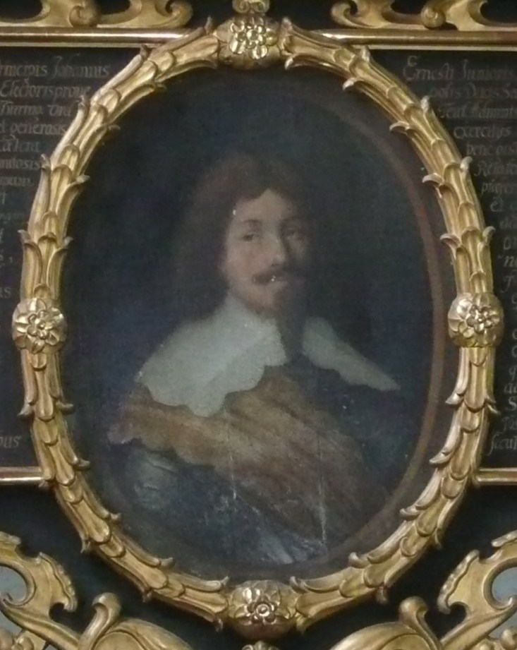 Gedächtnisbild in der Marienkirche in Königsberg in Bayern